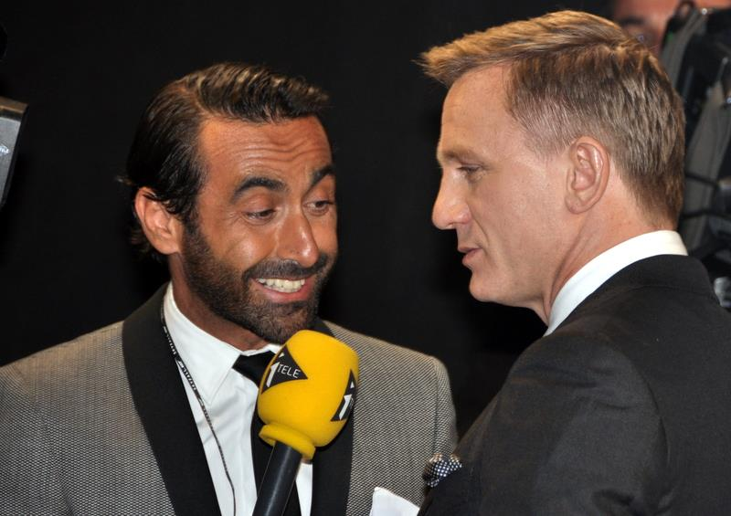 Olivier Benkemoun interviewant Daniel Craig, à l'avant-première française de "Skyfall"